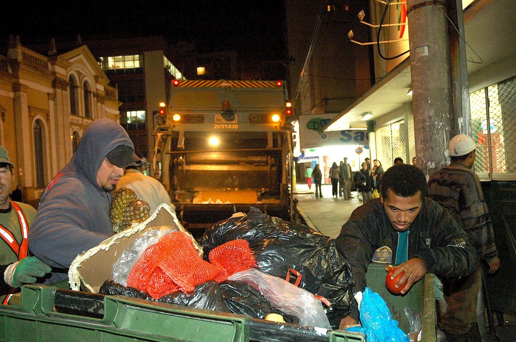 Mendigos disputam comida com o lixeiro.